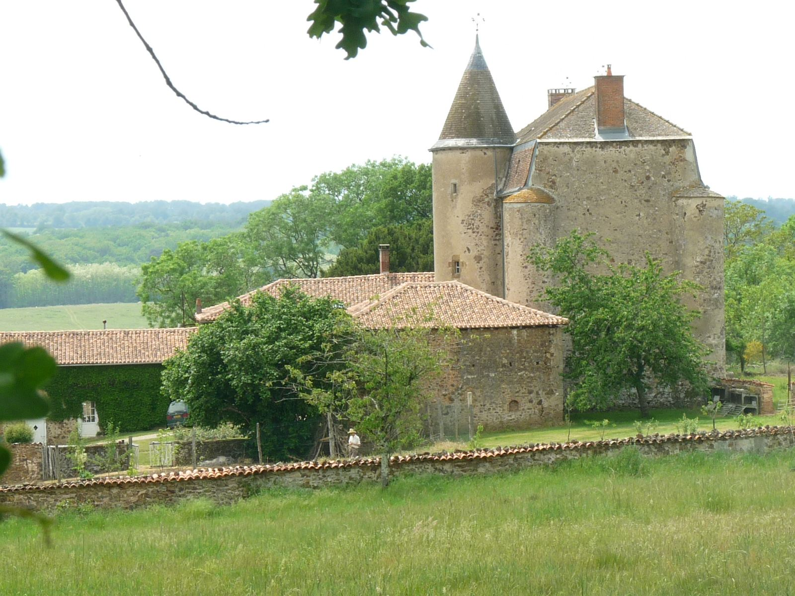 château de Fayolle, Abzac (16), France